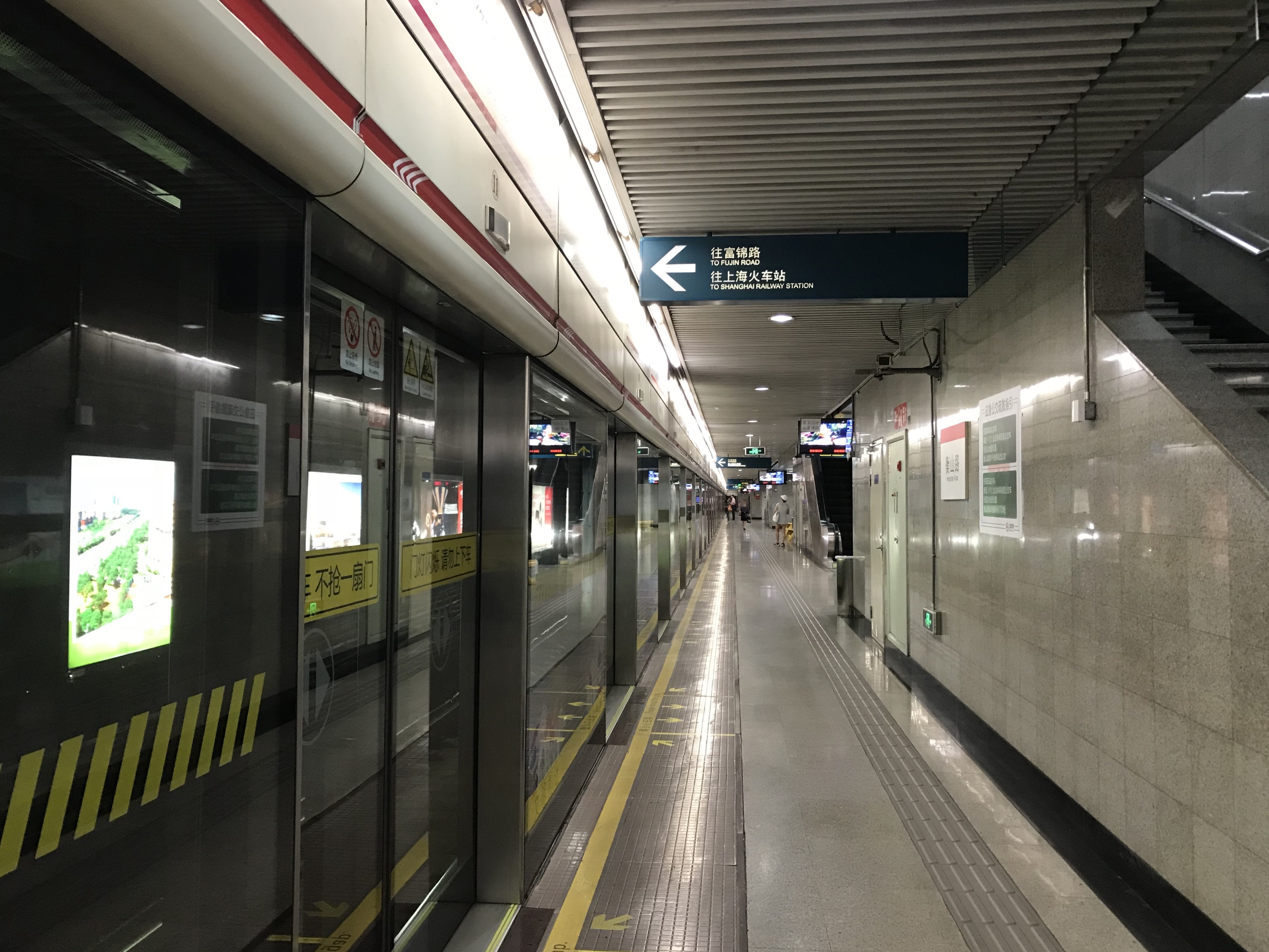 衡山路駅のホーム